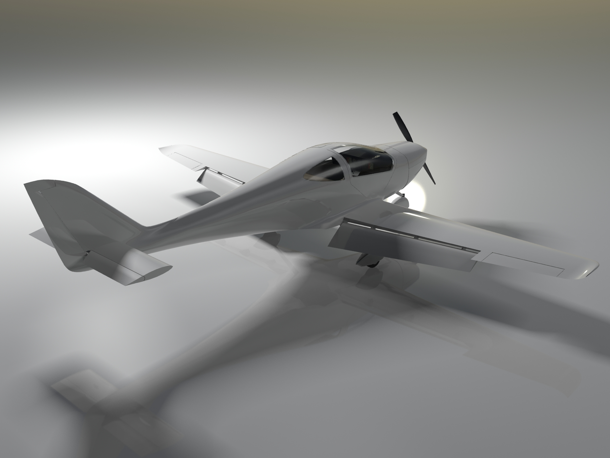 S-Vision preliminair ontwerp